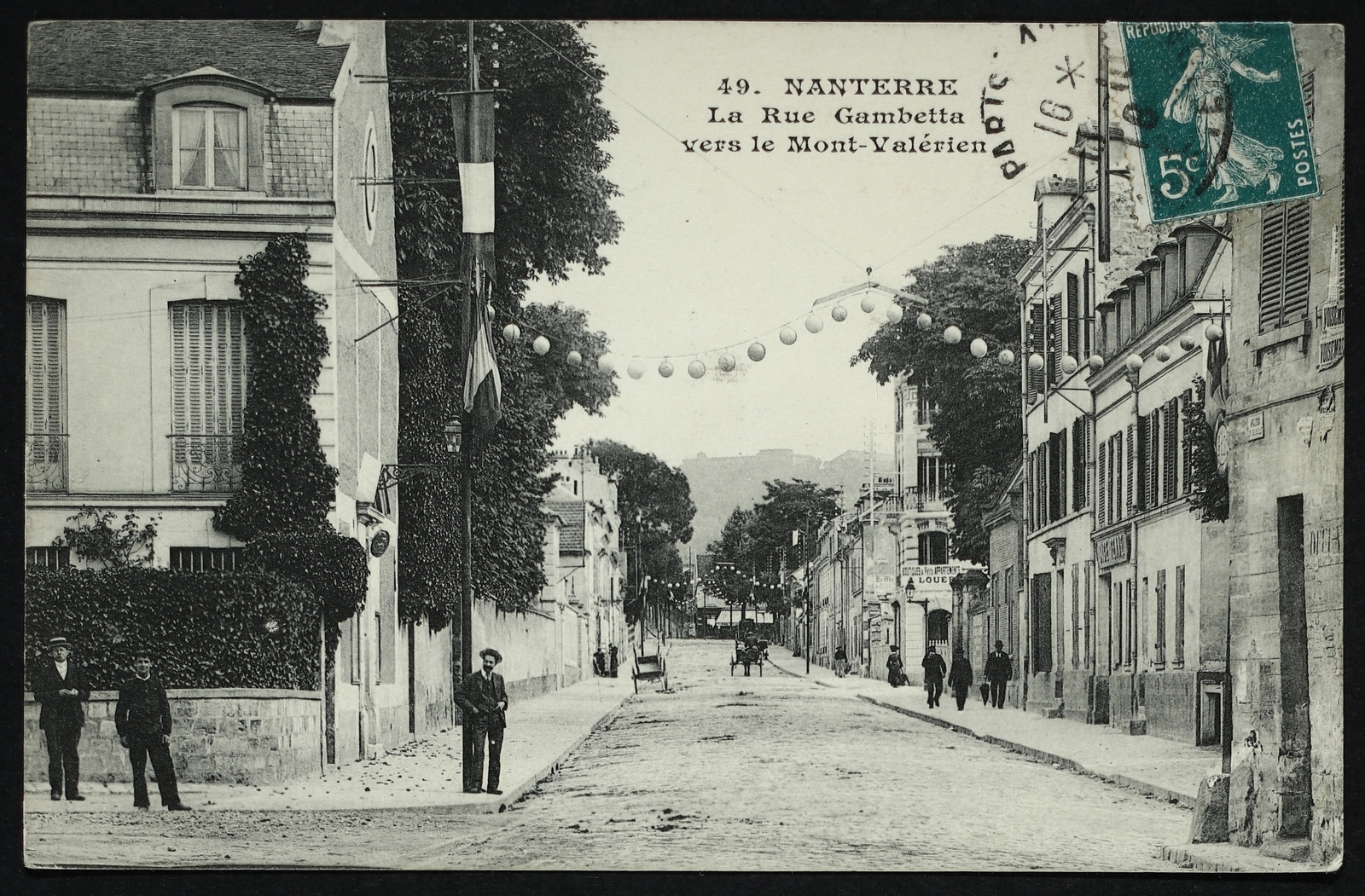 Nanterre.Rue Gambetta vers le Mont-Valérien